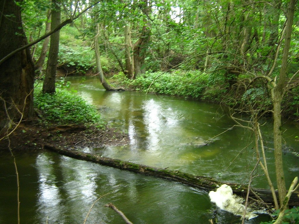 Die Nonne ist ein Fluß im Landkreis Mecklenburgische Seenplatte und der Hauptzufluß des Tollensesees. Sie entspringt im Wanzkaer See, ist ein naturbelassener Wildwasserbach und fließt überwiegend durch ein bewaldetes Tal.